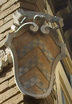 see description